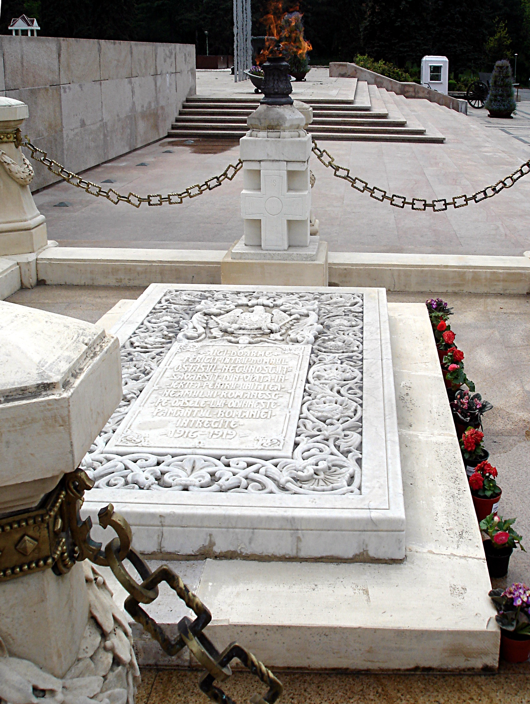 Mormântul Eroului Necunoscut din Parcul Carol I - Bucureşti - sculptor Emil Wilhelm Becker